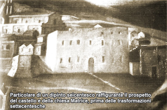 Castello ducale di Galatina (particolare di un dipinto del '600